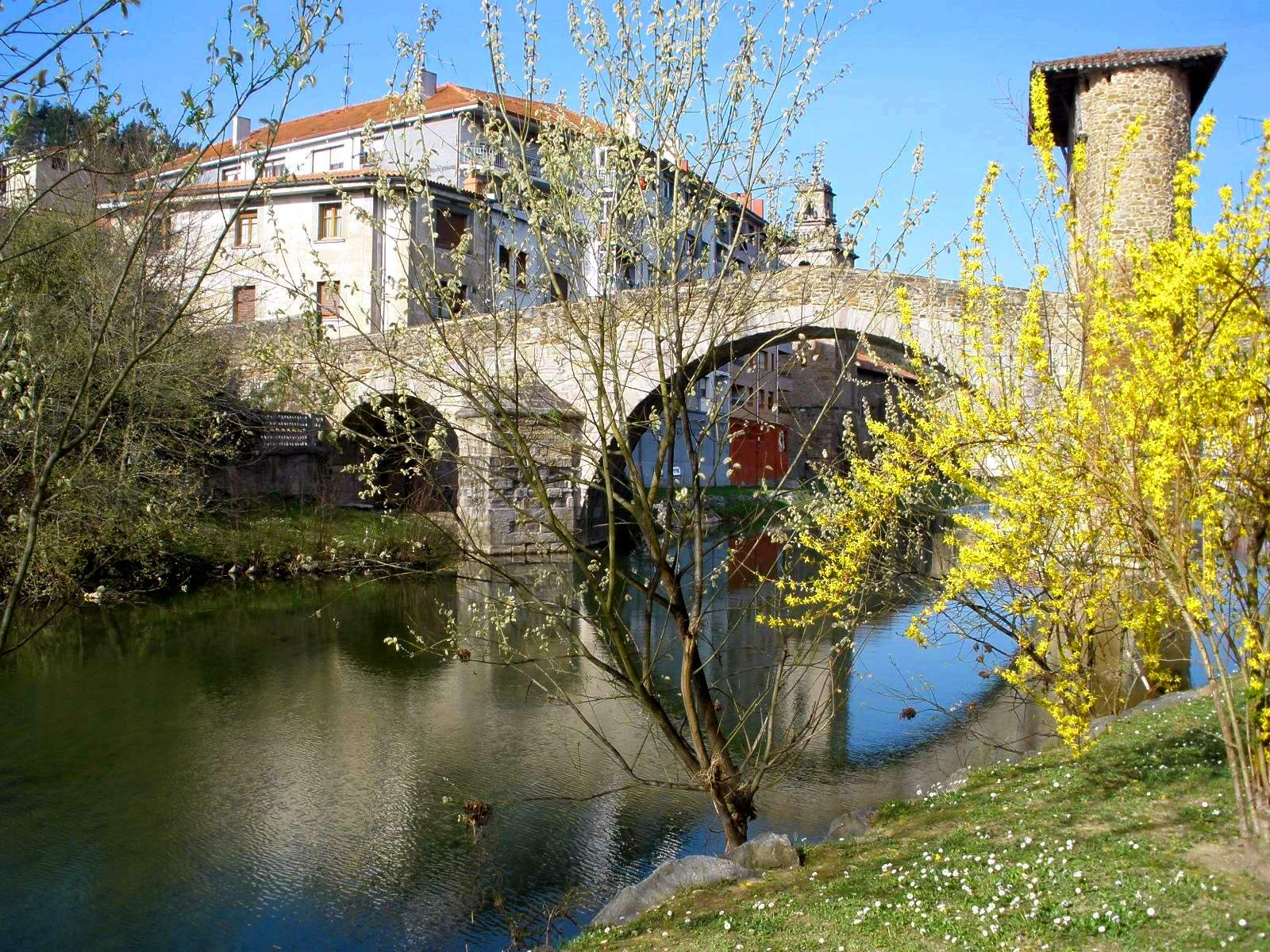 Puente Viejo de Balmaseda, sobre el río Cadagua (Vizcaya)